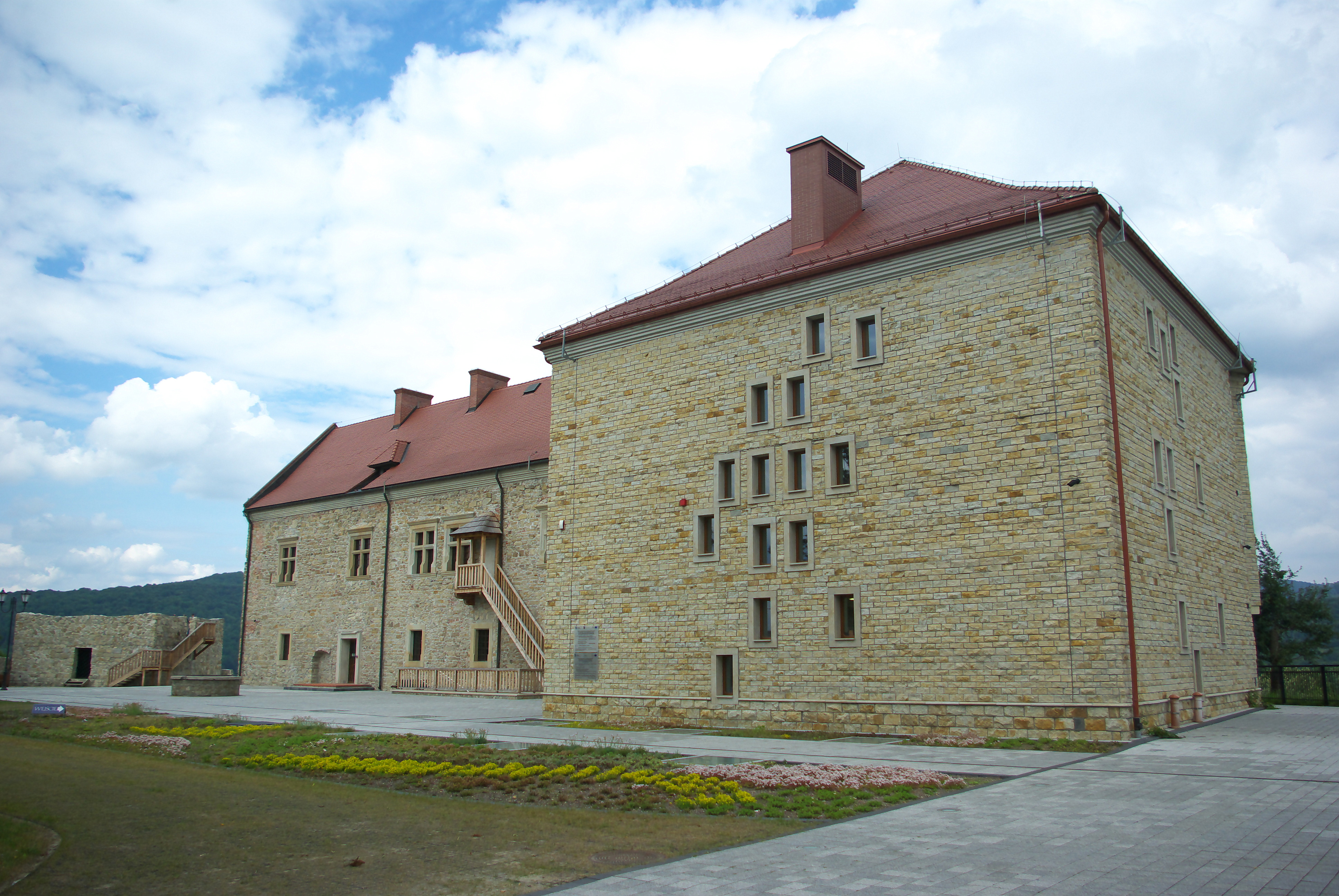 Zamek w Sanoku czerwiec 2014